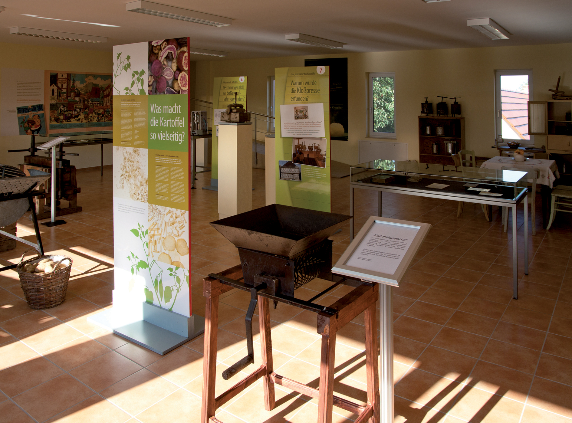 Thüringer Kloßmuseum in Heichelheim Hier kann man alles über das Thüringer Nationalgericht - die Thüringer Klöße - erfahren.